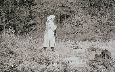 Huldra